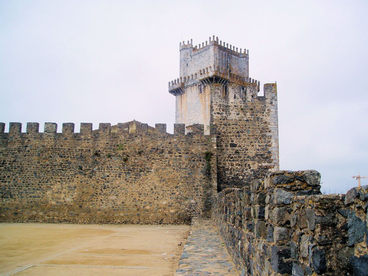 Portugal Beja Castle